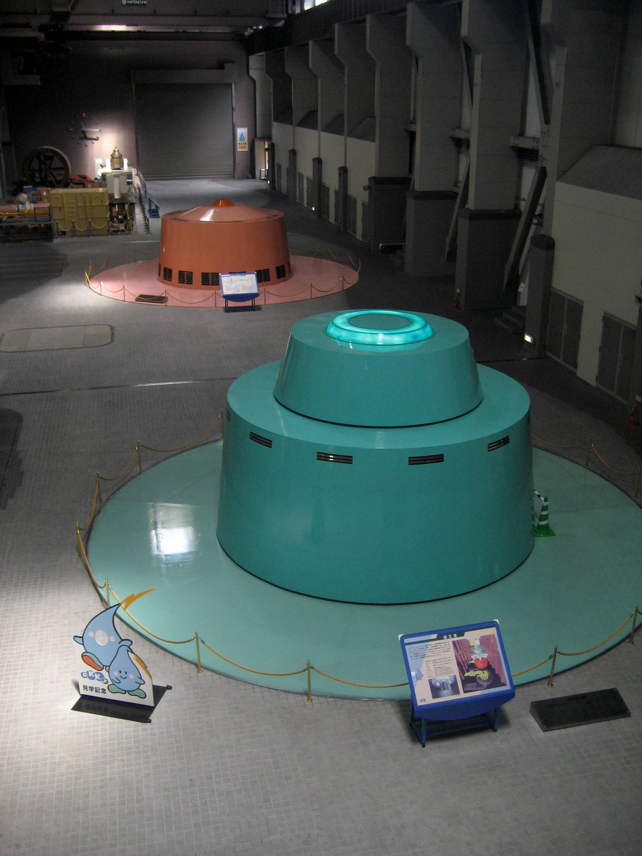 Futai Dam (二居ダム) in Yuzawa, Niigata, Japan.